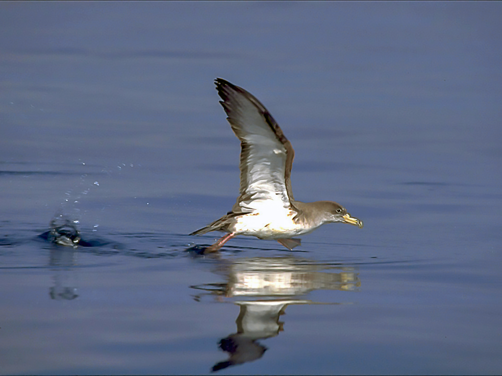 Puffin cendré Calonectris diomedea BOMPAR PNPC, Port-Cros, Îles d'Hyères, Var, Provence-Alpes-Côte d'Azur, France